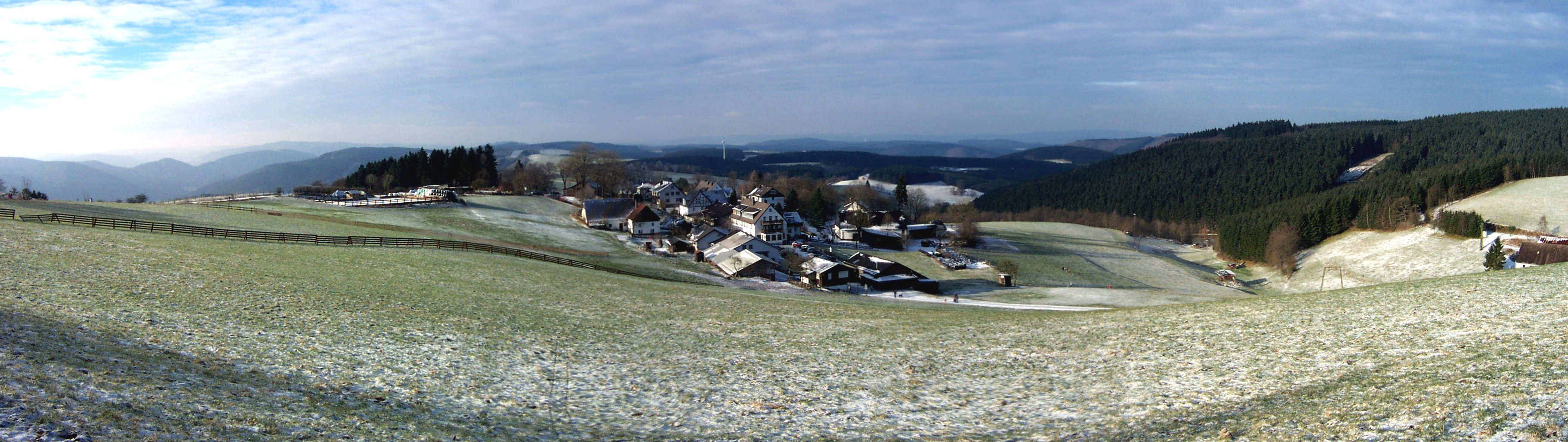 Panoramablick auf Wildewiese 2003